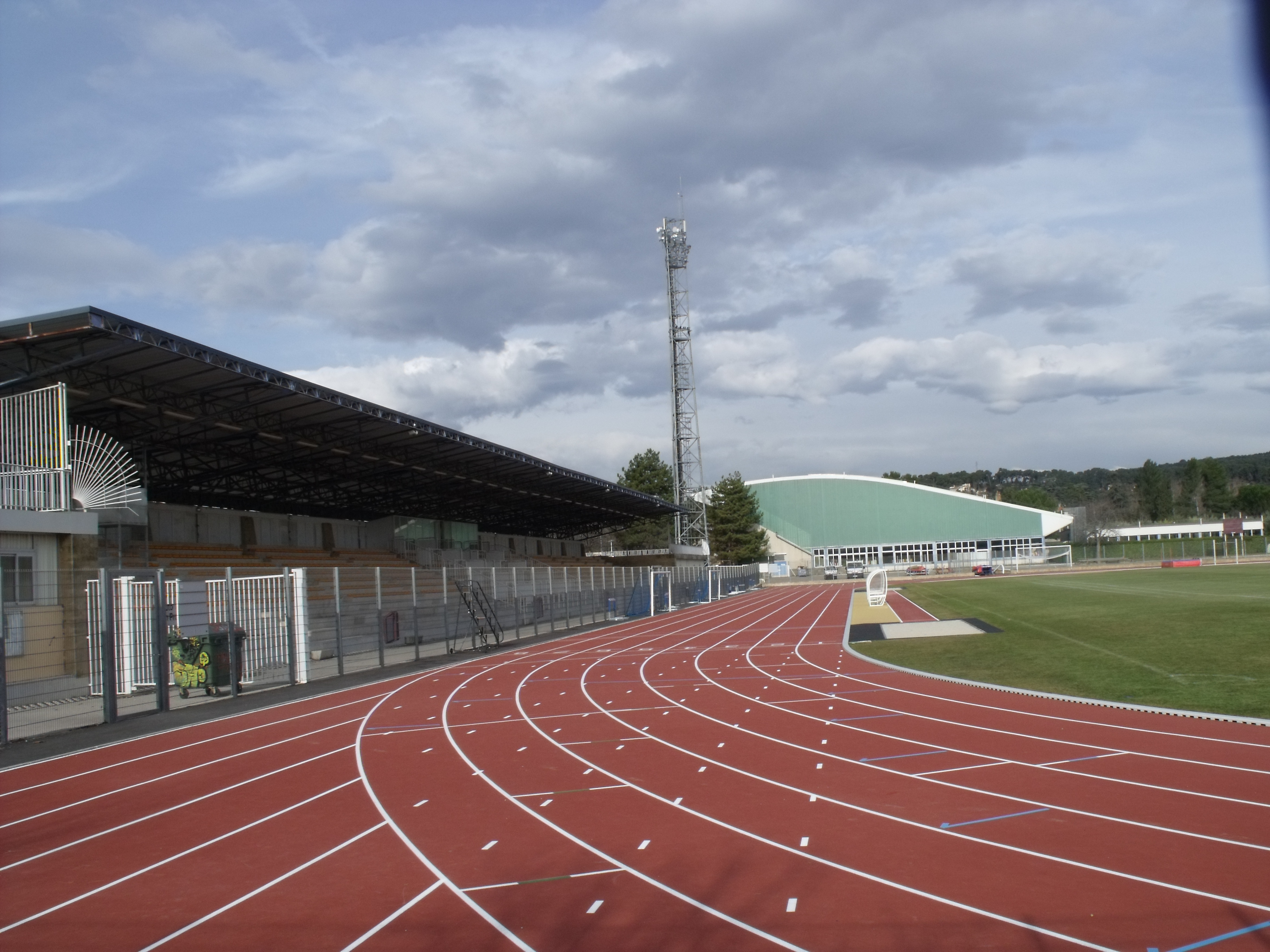 Stade Georges-Carcassonne, Aix-en-Provence (France)